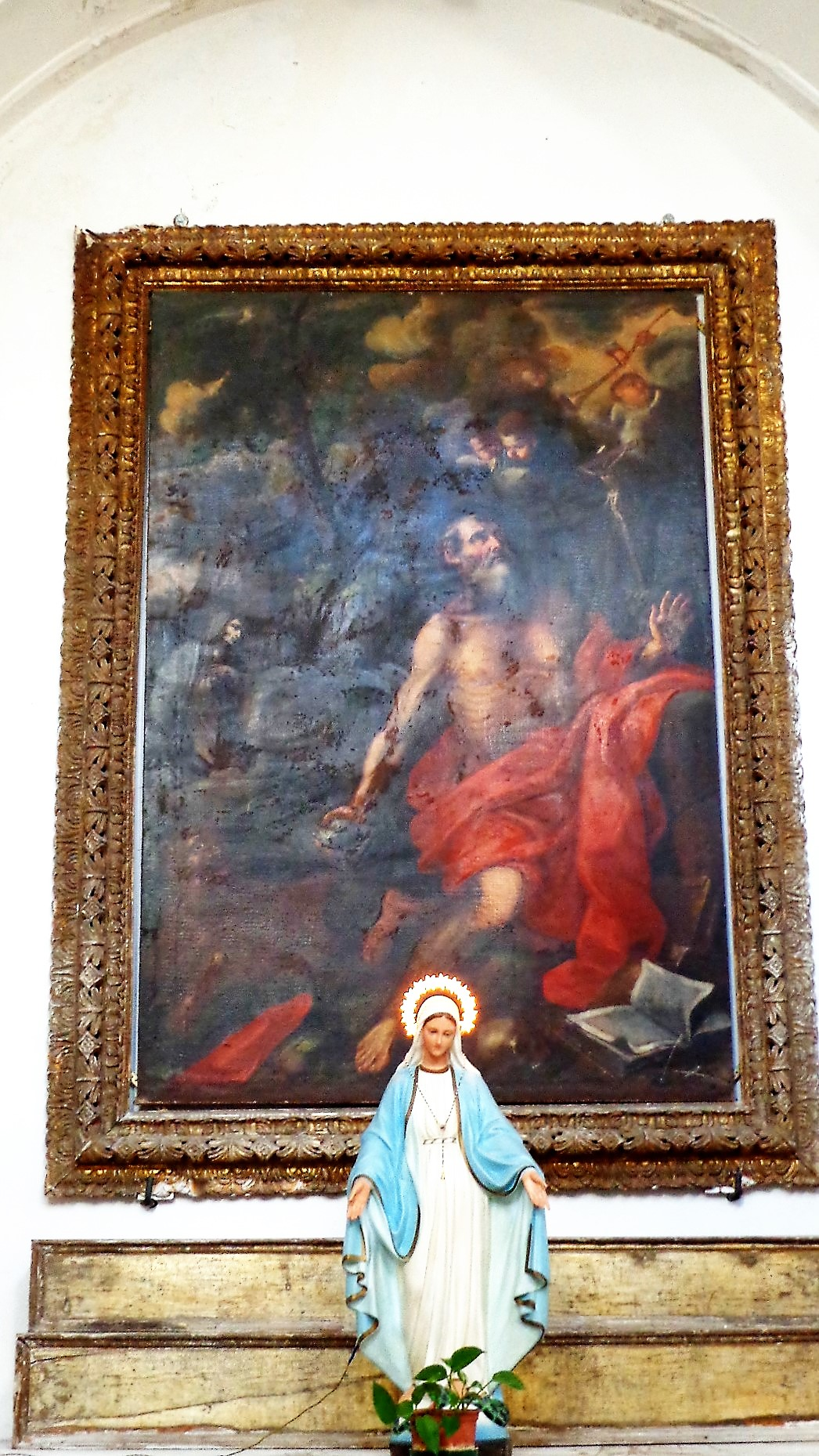 San Girolamo scrivente